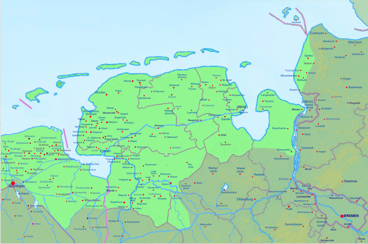 Screenshot of Backsteinbauwerke der Gotik/Verteilung zwischen Bremen und Groningen using File:Bremen Groningen Friesen.png